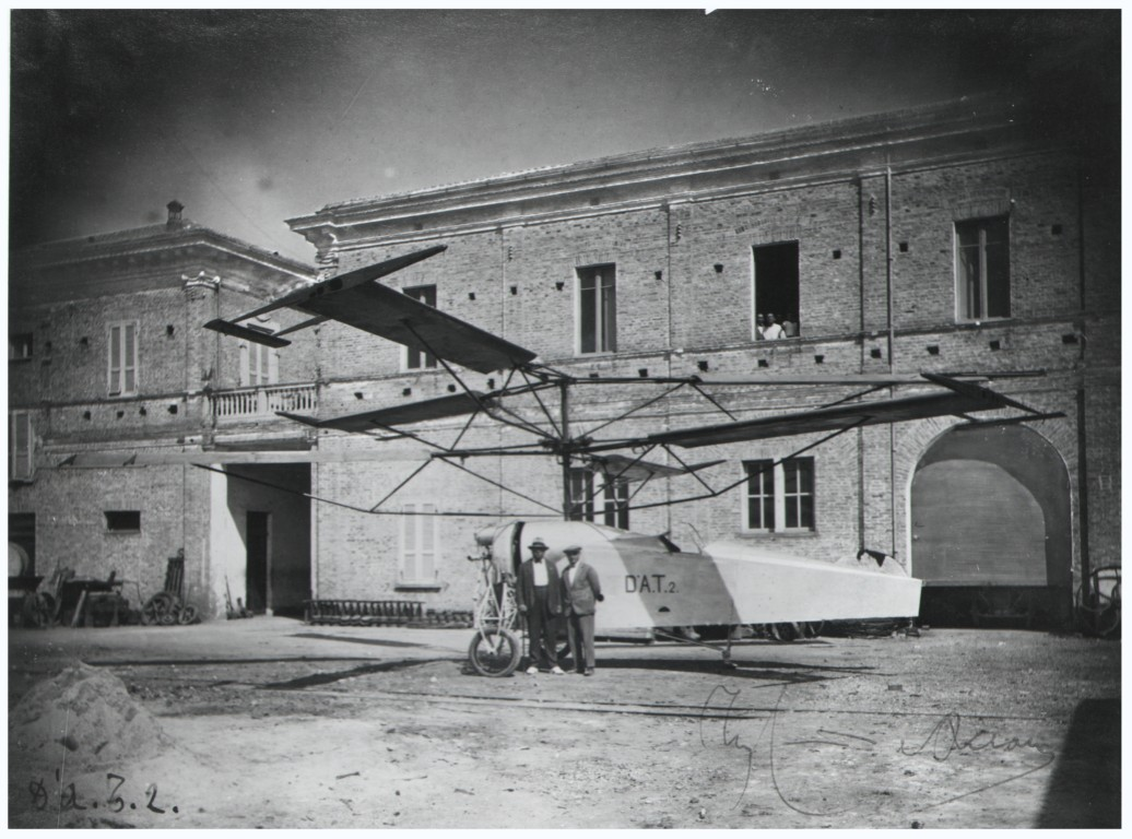 L'ingegnere Corradino D'Ascanio davanti al prototipo di elicottero DAT 2 presso le officine della fonderia Camplone, Pescara 1926 (AS Pescara, Archivio privato D'Ascanio Corradino, b. 1, fasc. 15, n. 3)